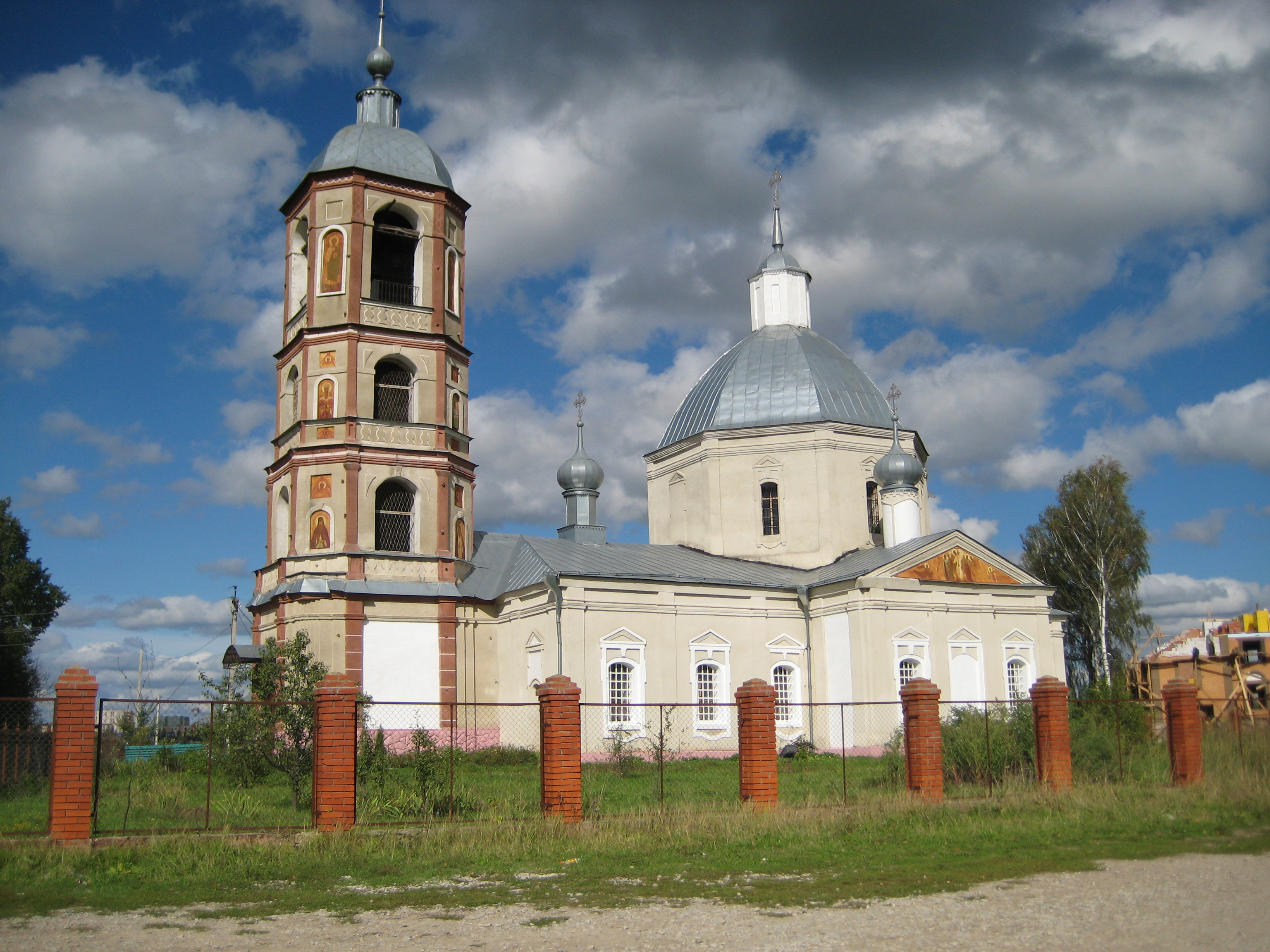 Троицкое, Калужская область. Троицкая церковь